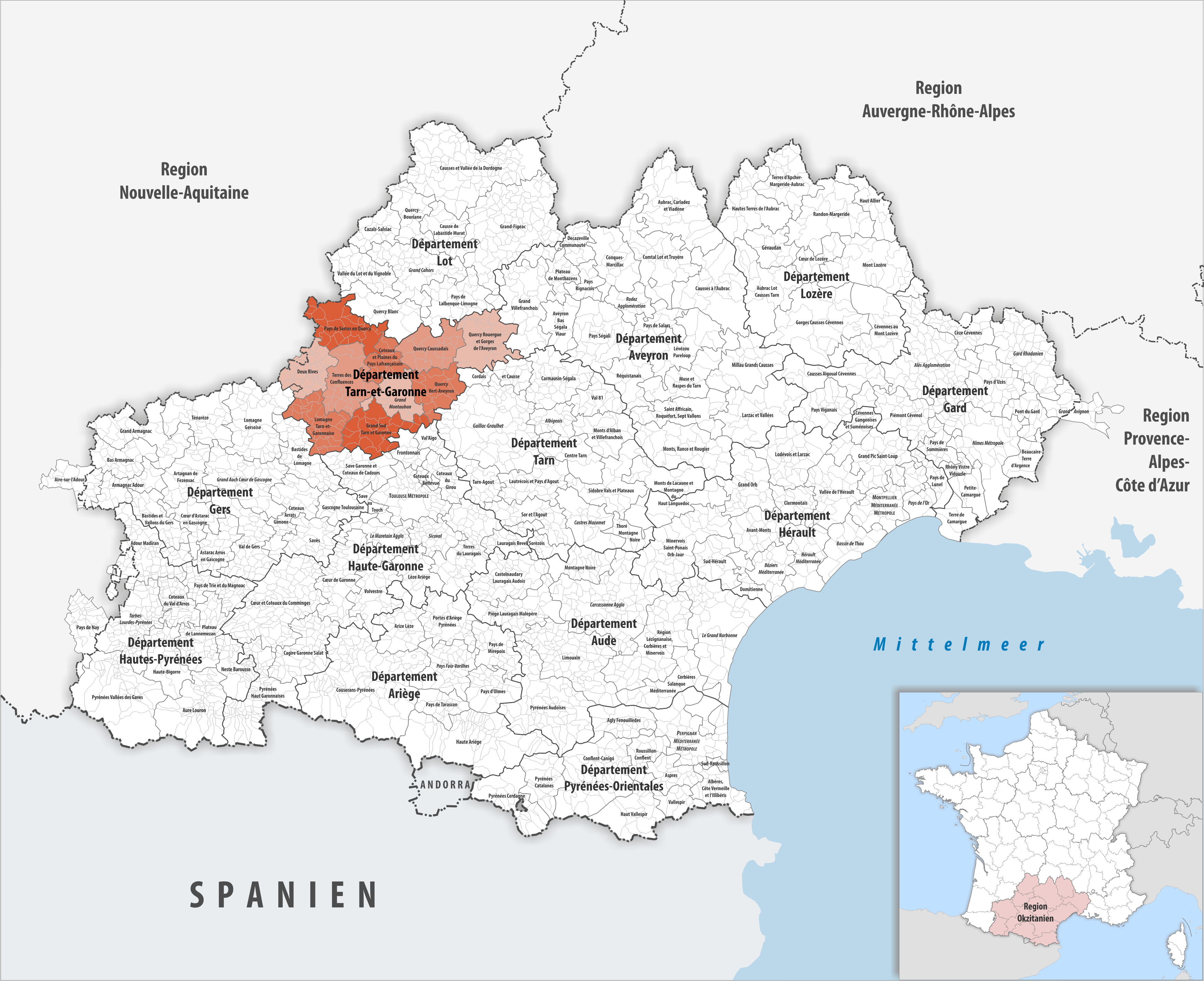 Gemeindeverbände im Département Tarn-et-Garonne